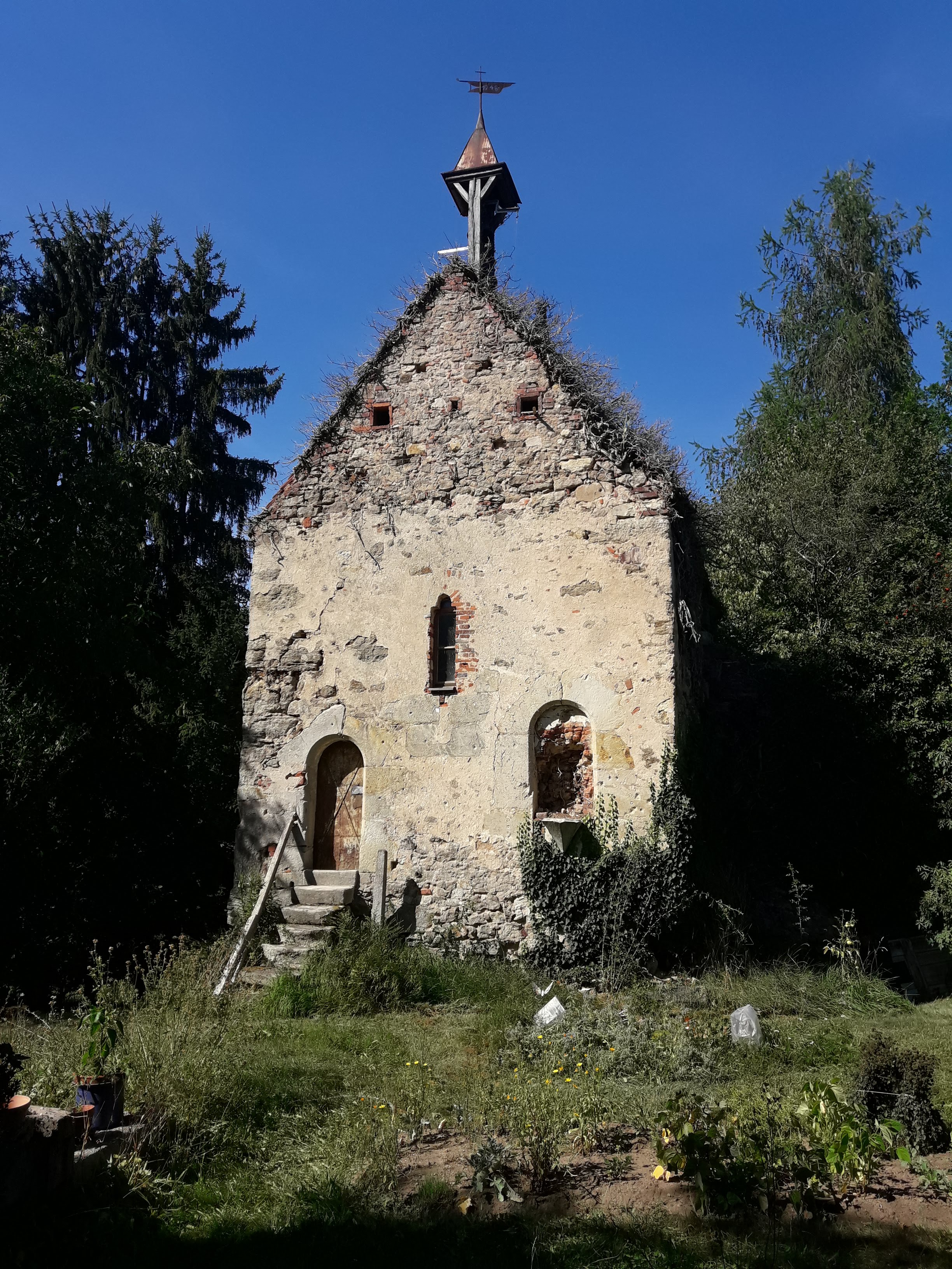 Kapelle der ehemaligen Wasserburg Eybburg